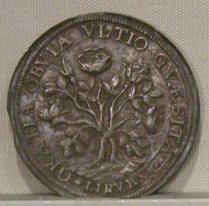 Firenze, ferdinando II de' medici, 1620-1670, zecca di firenze per livorno